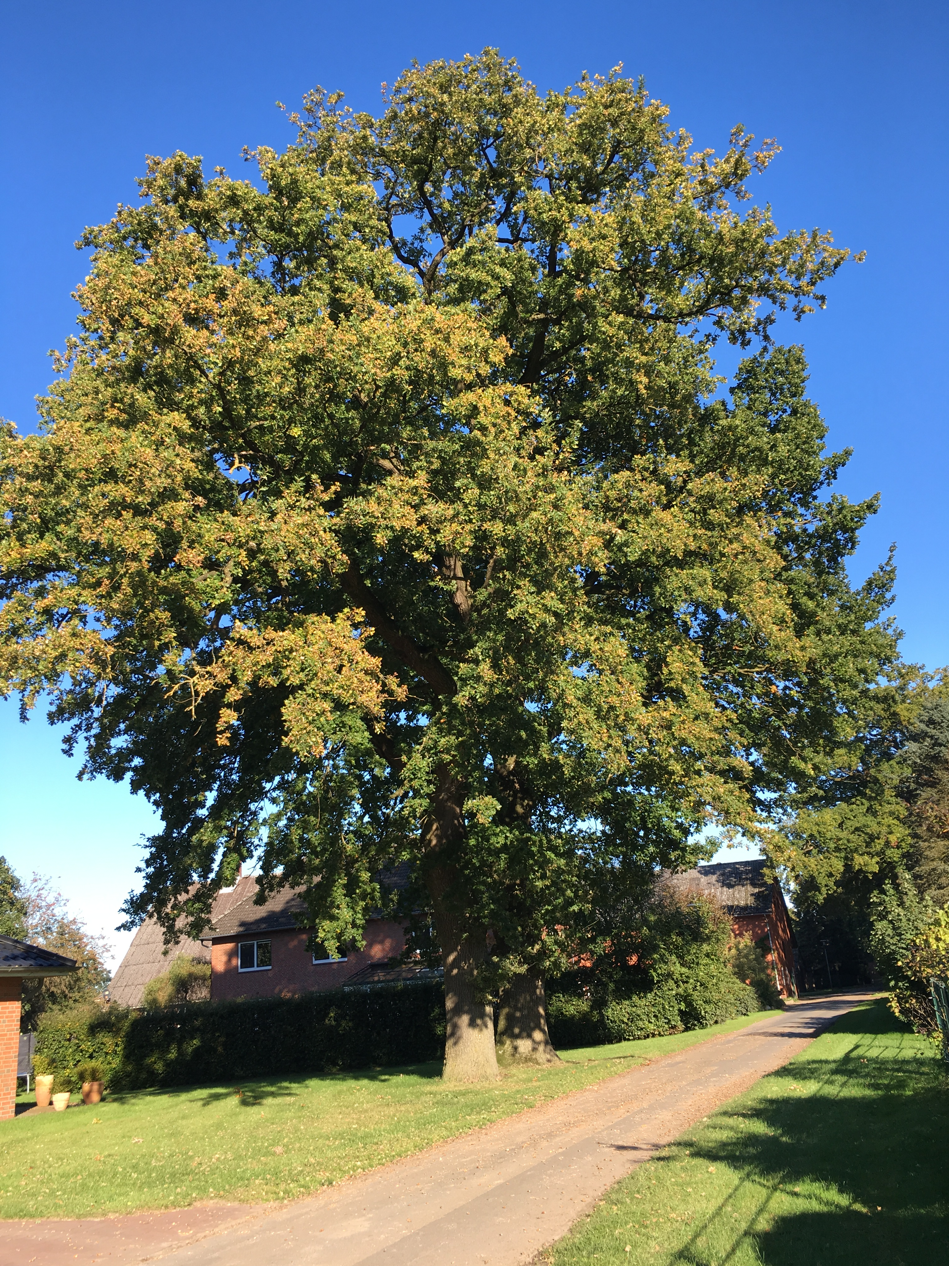 Eek in Alfst, de as Naturdenkmaal schuult is